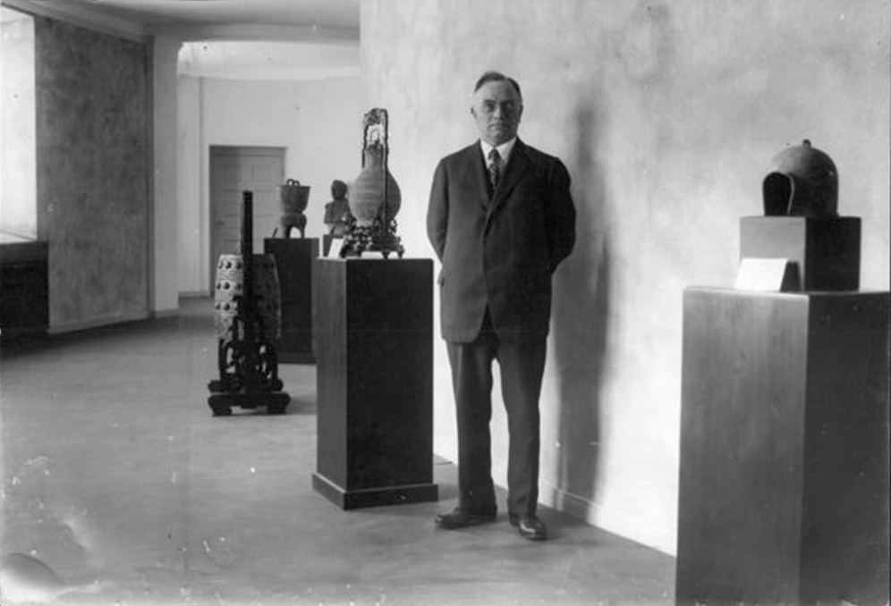 Framstående geologen och Kinaforskaren J. Gunnar Andersson som handhar Kinakommitténs samlingar, vilka sammanförts till en för lekmän avsedd utställning i Handelshögskolan. This is a photo of an artwork at the Museum of Far Eastern Antiquities in Sweden with the identifier: K-11002-001